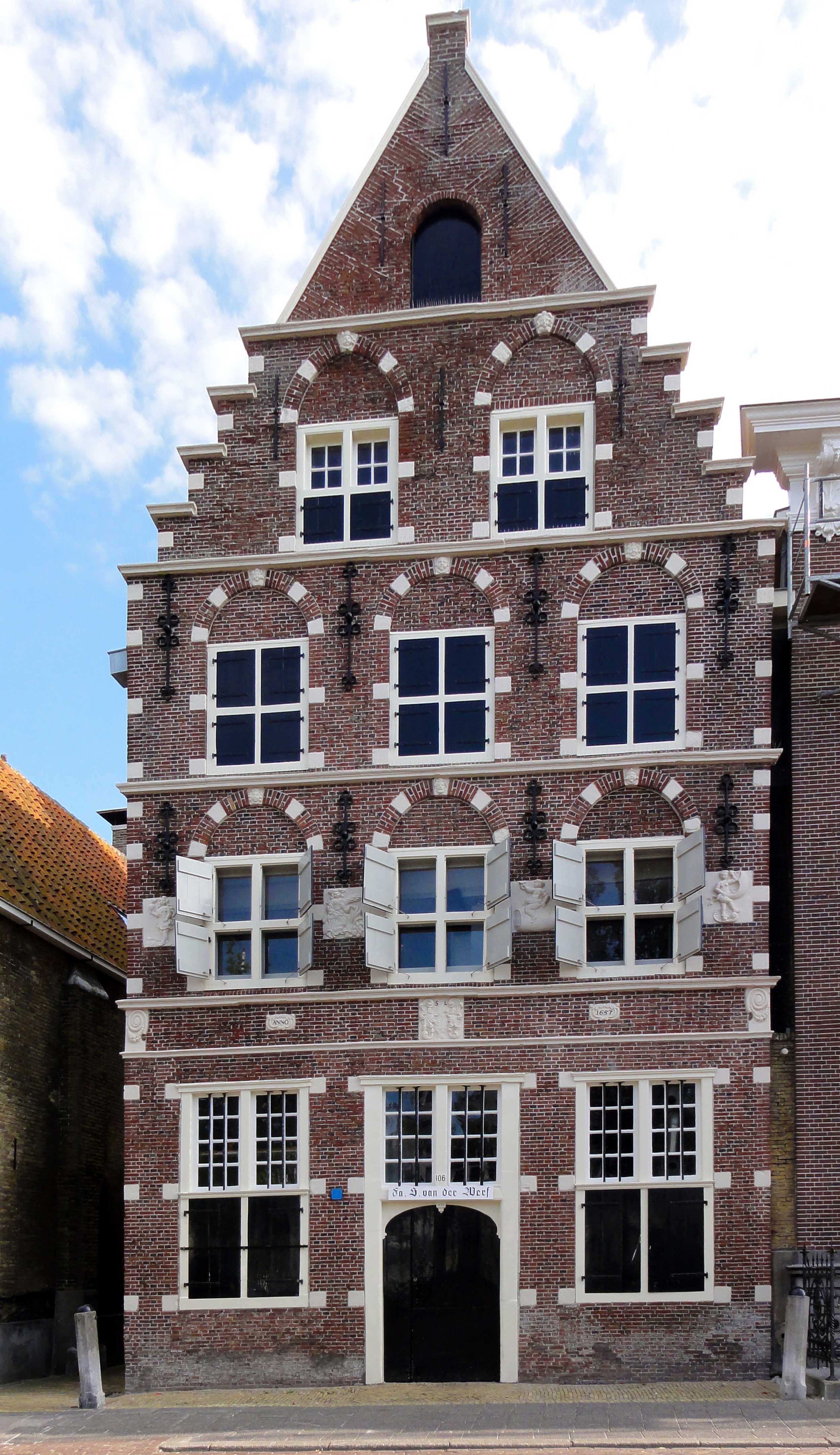 Noorderhaven 106 in Harlingen